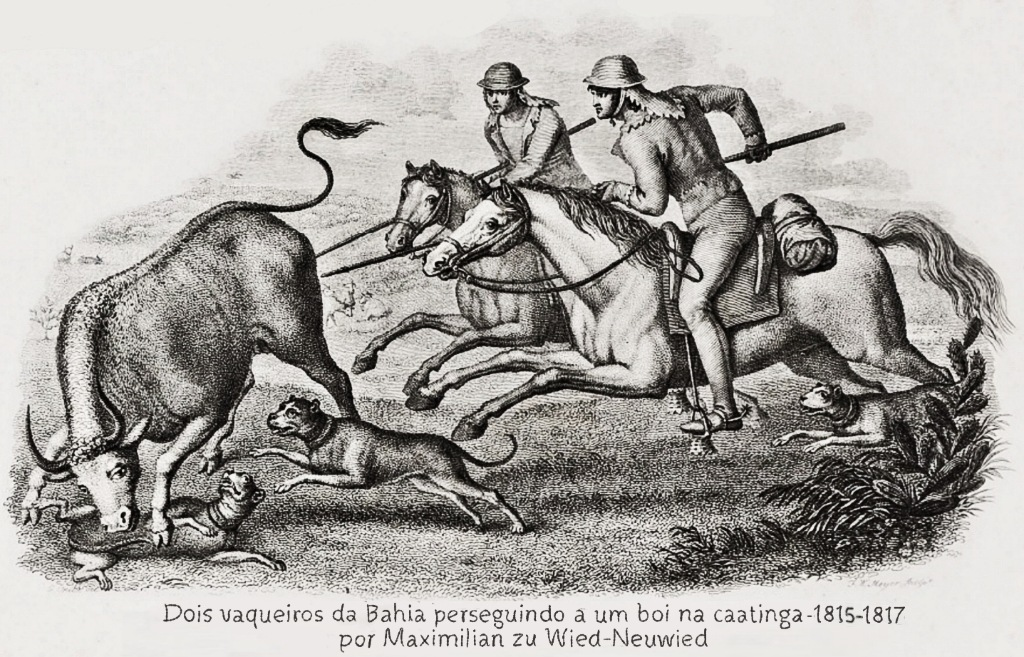 Obra apresentada pelo príncipe Maximilian zu Wied-Neuwied no início do século XIX. Se trata de um cão da raça fila brasileiro auxiliando vaqueiros (que usam trajes de couro) a capturar um boi bravio. Maniere de prendre les buffles par le Vaqueiro, Voyage du Prince de Neuwied en Bresil. II vo. Vt. 1815-1817.